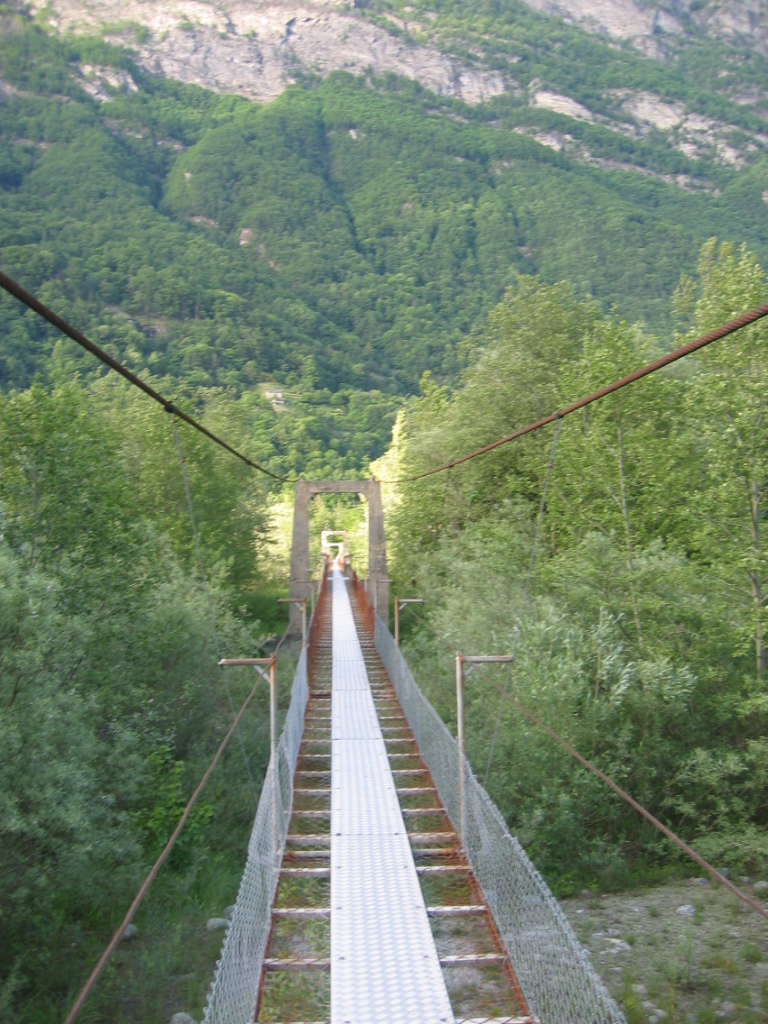 Hängebrücke bei Someo, Tessin, Schweiz. Die Brücke führt über die Maggia und ist etwa 500m lang.